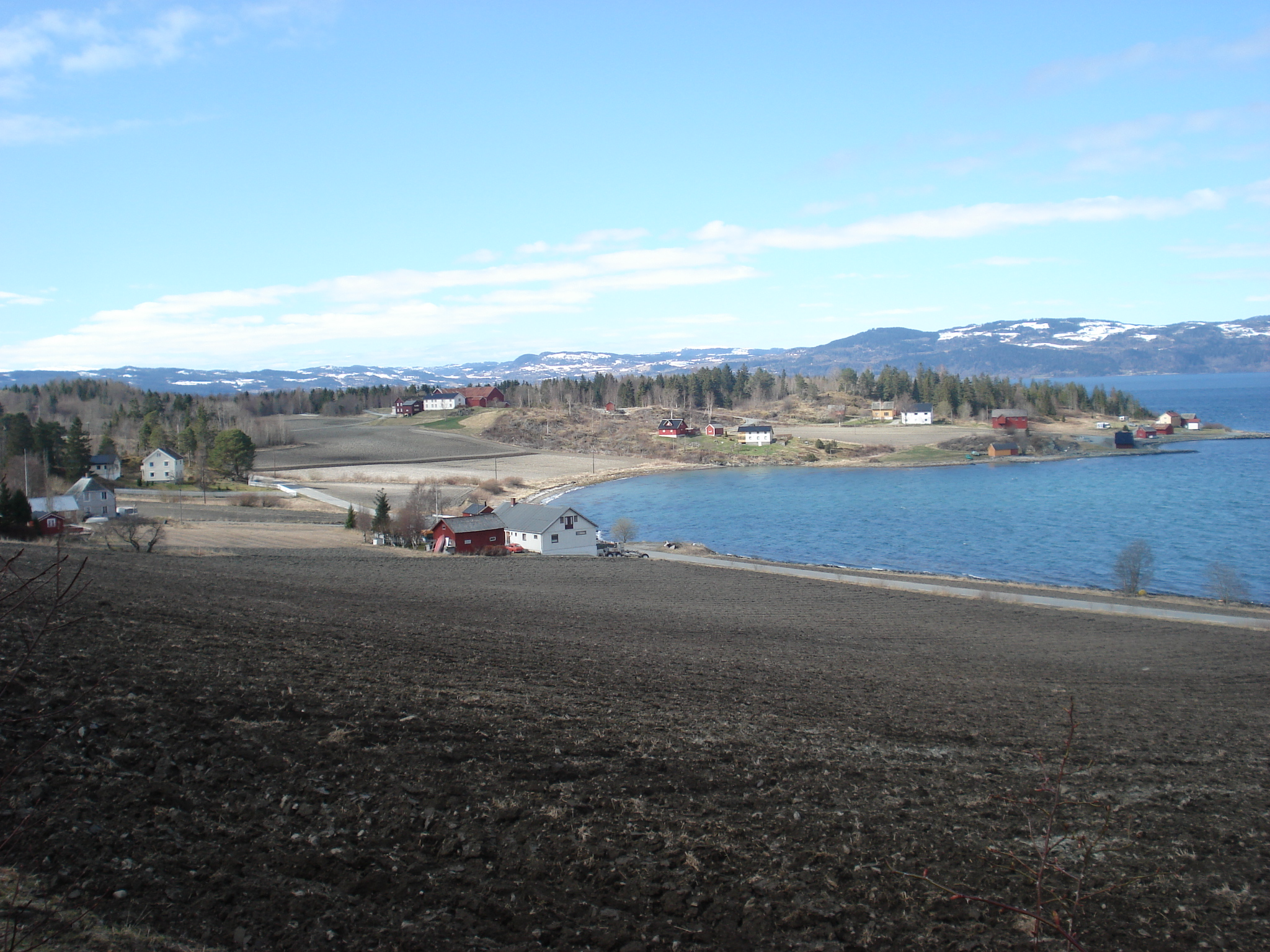 Fånes set frå aust med utsyn til Leksvik på andre sida Trondheimsfjorden